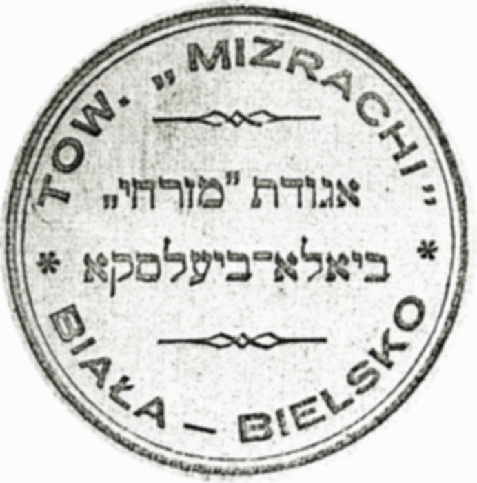 Towarzystwo Mizrachi Biała Bielsko